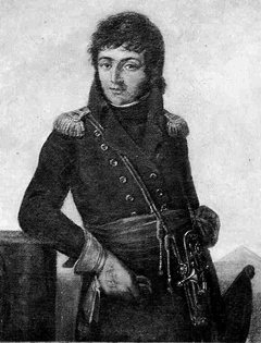 Représentation du Général François Lanusse.